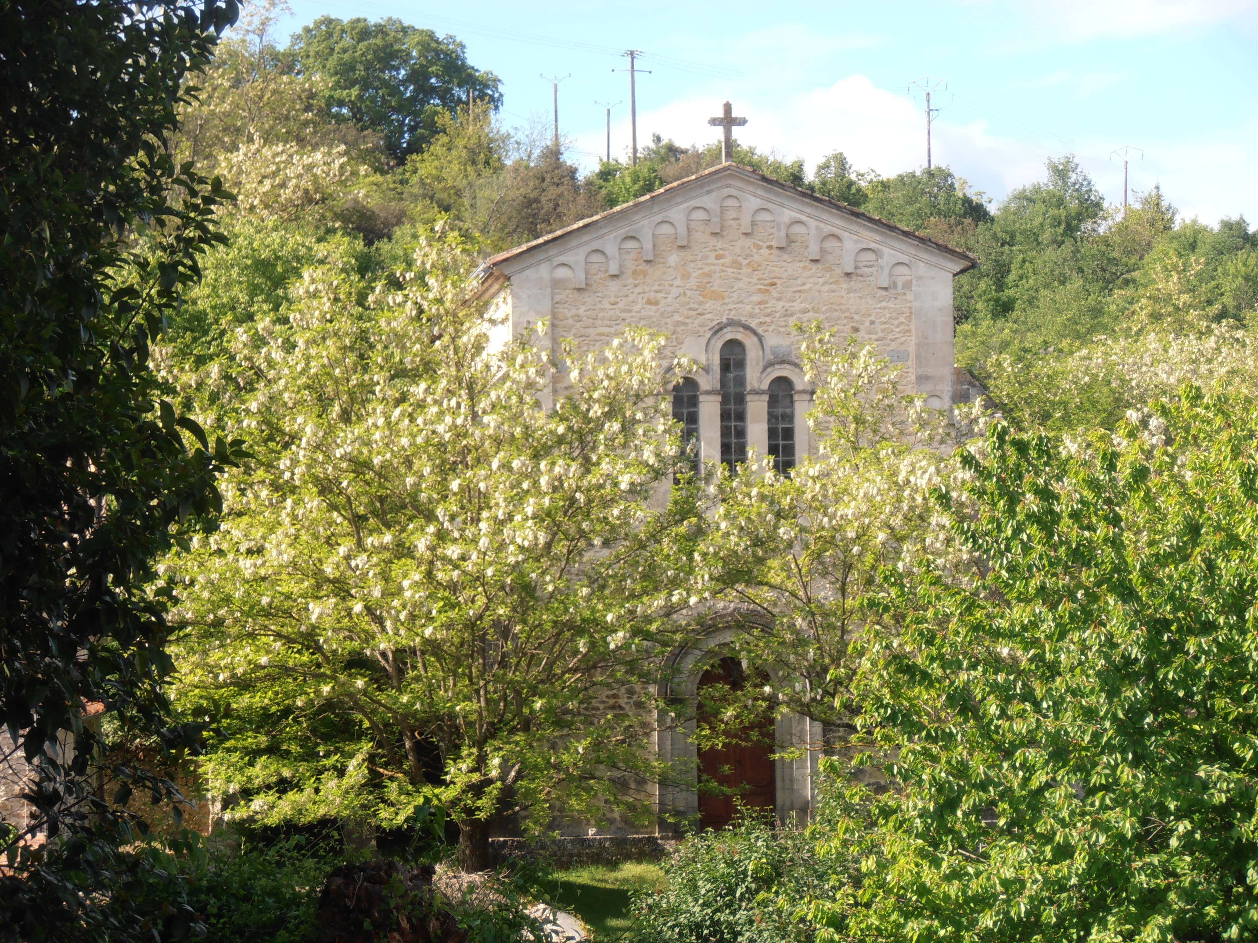 Ardèche, Salavas. Après la destruction des églises par les protestants en 1568 et suite à la loi sur la liberté des cultes après la révolution, une nouvelle église catholique et un temple seront construits. La cloche de l'église (1848) est présentée devant l'édifice